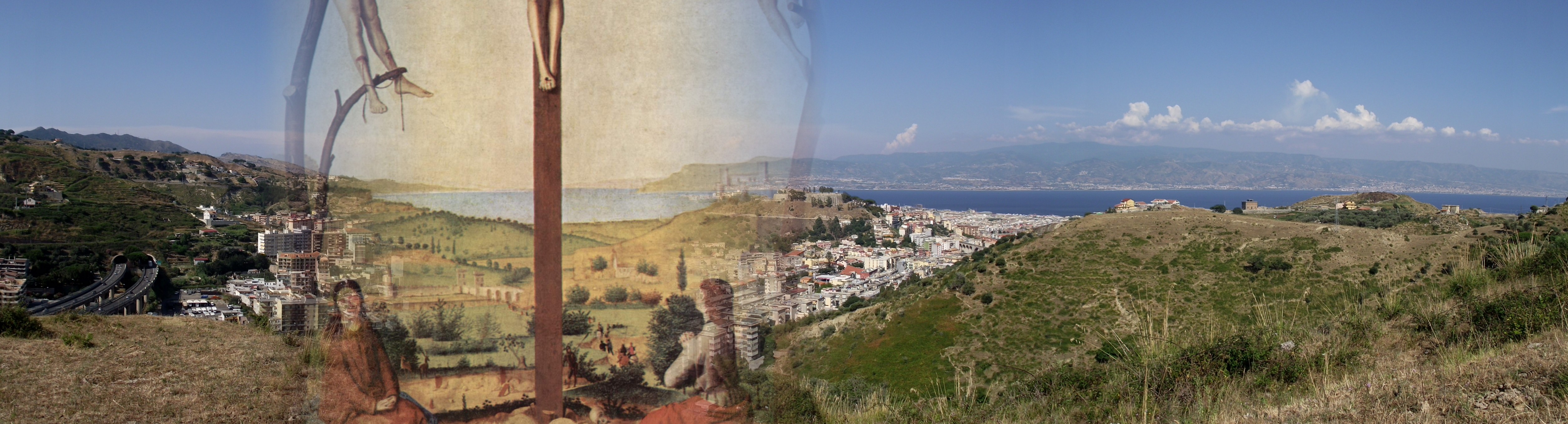 panorama dello stretto di messina